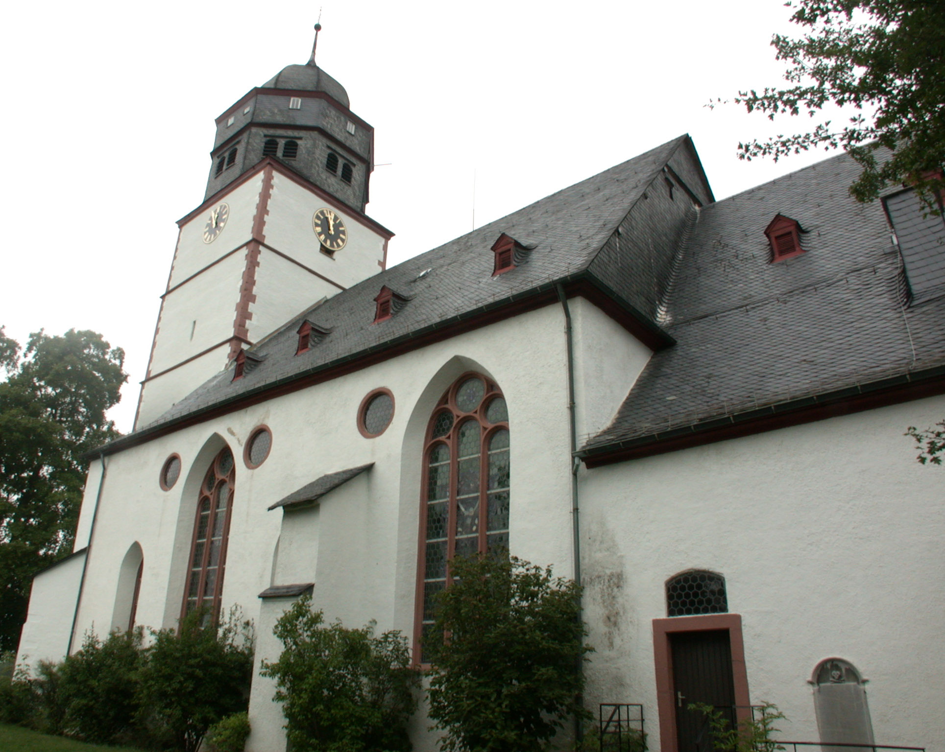 Laurentiuskirche, Usingen, Deutschland